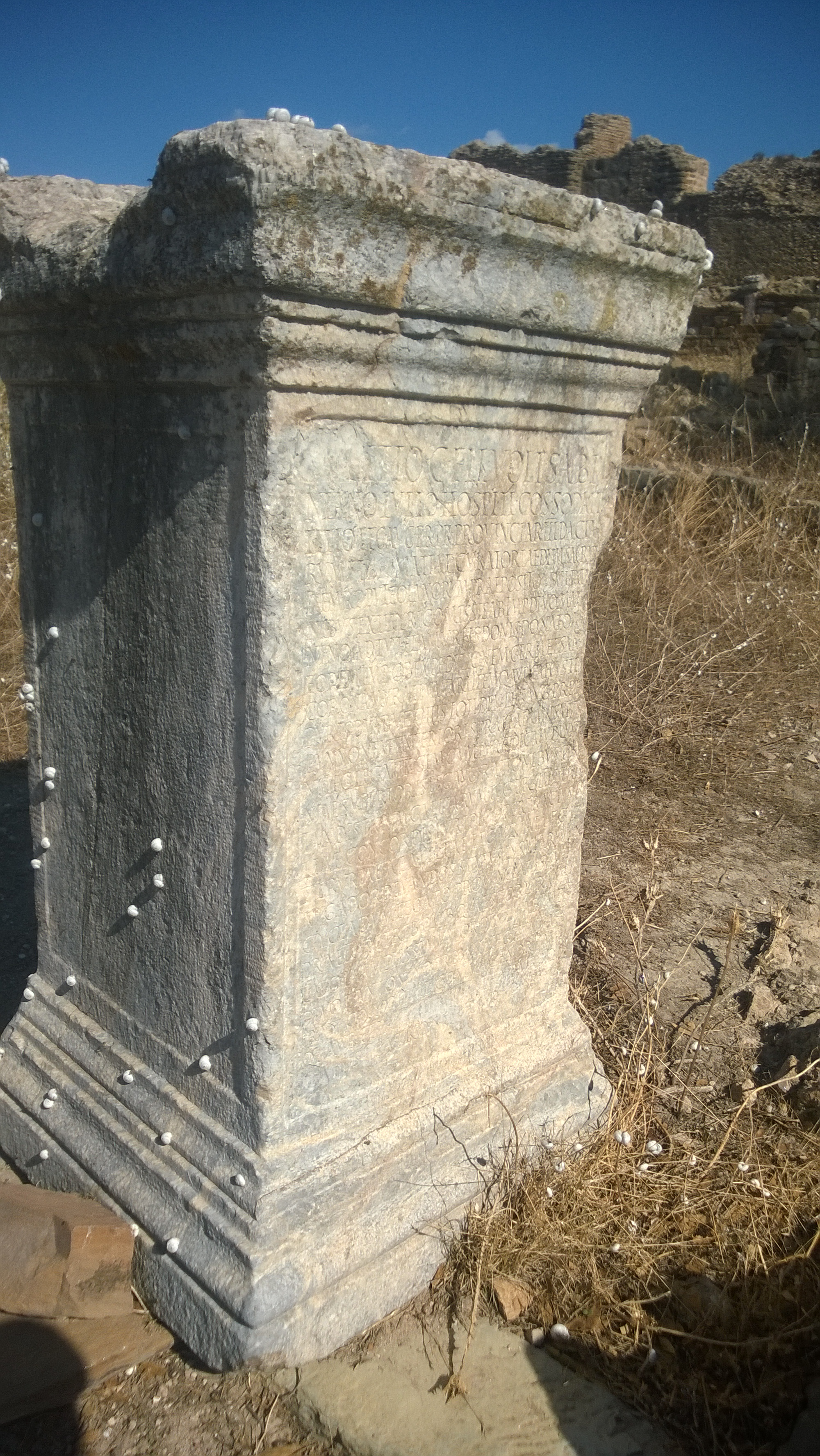 Stèle sur le site de Thuburbo Majus (Tunisie). AE 1920, 45 = AE 1939, 81: C(aio) Vettio C(ai) fil(io) Volt(inia) Sabi/niano Iulio Hospiti co(n)s(uli) sodali / Titio leg(ato) Aug(usti) pr(o) pr(aetore) provinciar(um) III Dacia/rum et D lmatiae curatori aedium sacrar(um) / item r(ei) p(ublicae) Puteolanorum praeposito vexillatio/nibus ex Illyrico missis ab Imp(eratore) divo M(arco) An[to]/nino ad tutelam urbis donis donato a[b] / eodem Imp(eratore) ob expeditionem Germ(anicam) et Sarm(aticam) / corona murali vallari itemq(ue) aurea hastis / puris duab(us) vexillis totidem leg(ato) Aug(usti) pr(o) pr(aetore) / Pannoniae inferioris praef(ecto) aerari(i) Satur/ni leg(ato) leg(ionis) XIIII Gem(inae) cum iurisdicatu Panno/niae superioris leg(ato) Aug(usti) rationibus pu/tandis trium Galliarum leg(ato) leg(ionis) III Ita/li(c)ae Concordis iuridico per tractus / Etruriae Aemiliae Liguriae leg(ato) / Aug(usti) ad ordinandos status insularum / Cycladum legato provinciae Asiae / praetori trib(uno) pleb(is) quaestori trans/lato in amplissimum ordinem ab Imp(eratore) / divo T(ito) Antonino trib(uno) mil(itum) leg(ionis) I Itali(c)ae / praef(ecto) cohortis II Commagenorum / col(onia) Aurelia Commoda Thuburbo / [M]aius patrono d(ecreto) d(ecurionum) p(ecunia) p(ublica)